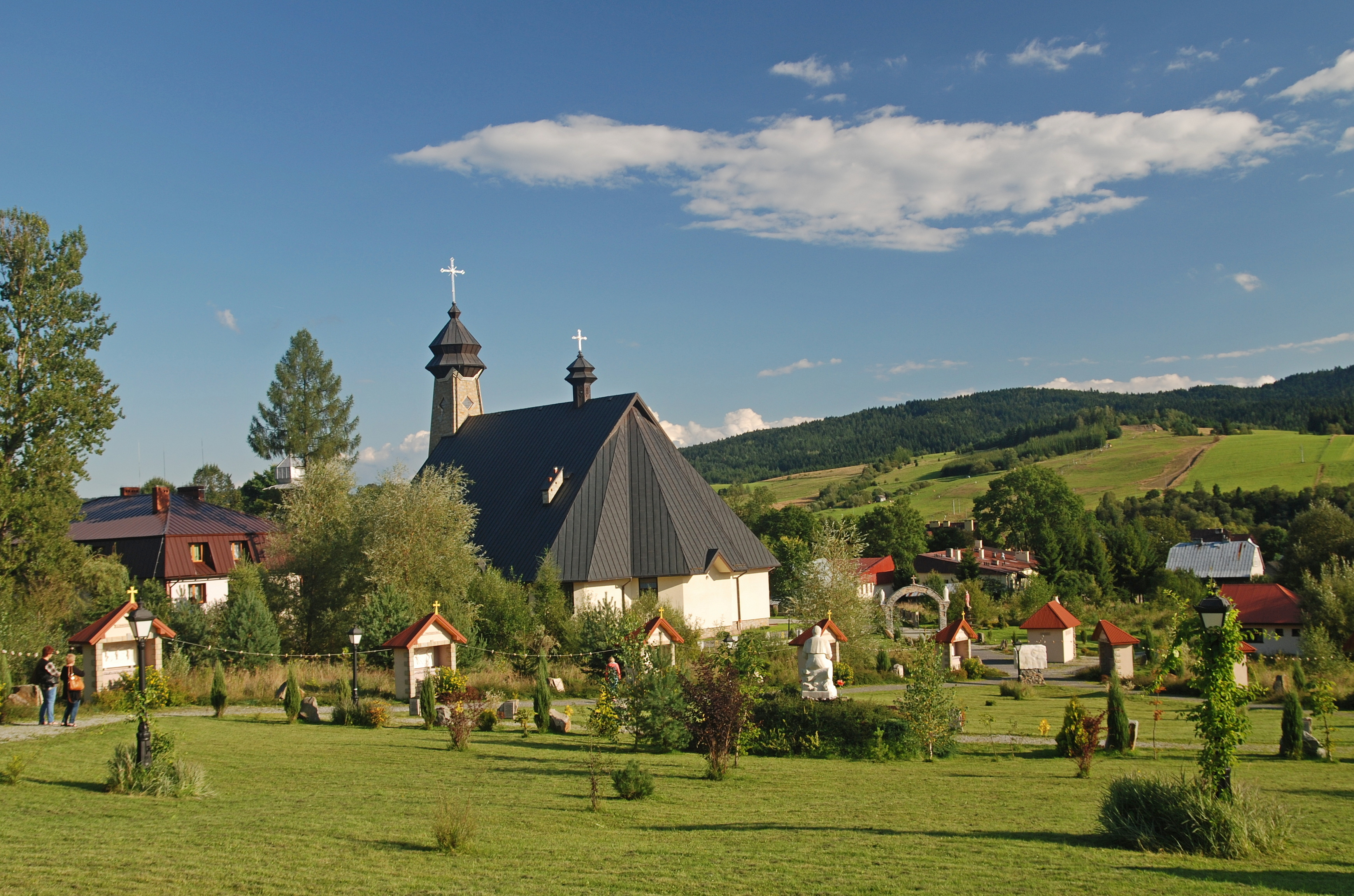 wieś Tylicz